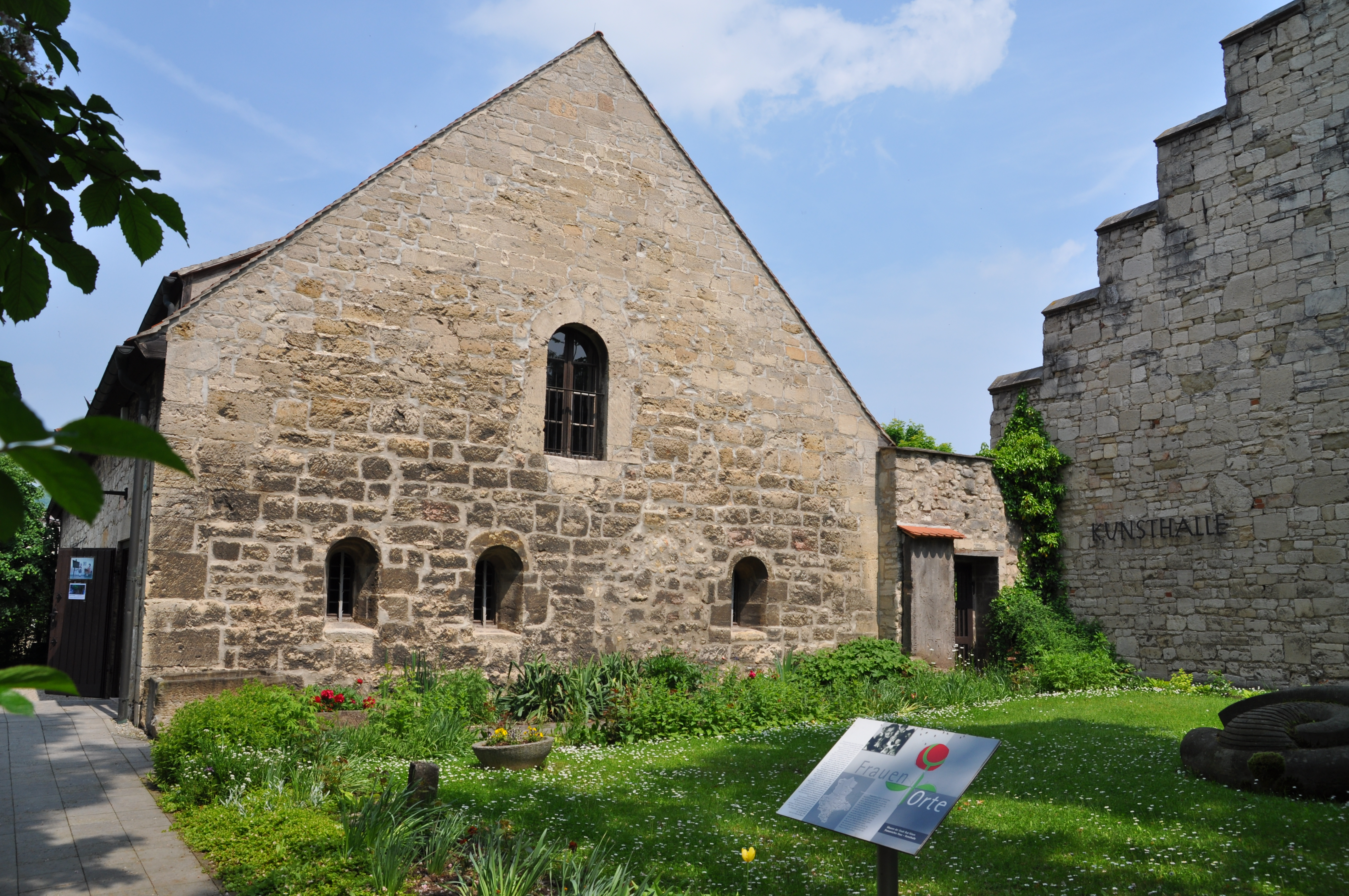 Romanisches Haus in Bad Kösen (Stirnseite); rechts die Kunsthalle (Zugang nur durch das Romanische Haus, über dessen Hof)